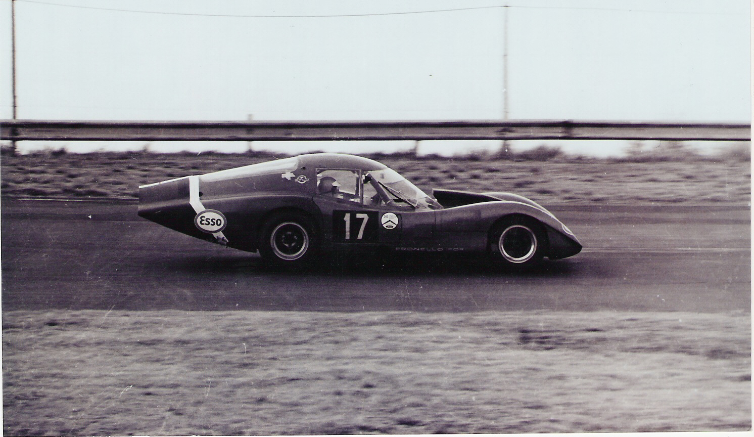 El Huayra girando a mas de 200km/h con la extension de la cola que se agregaba para correr en circuitos muy rapidos.